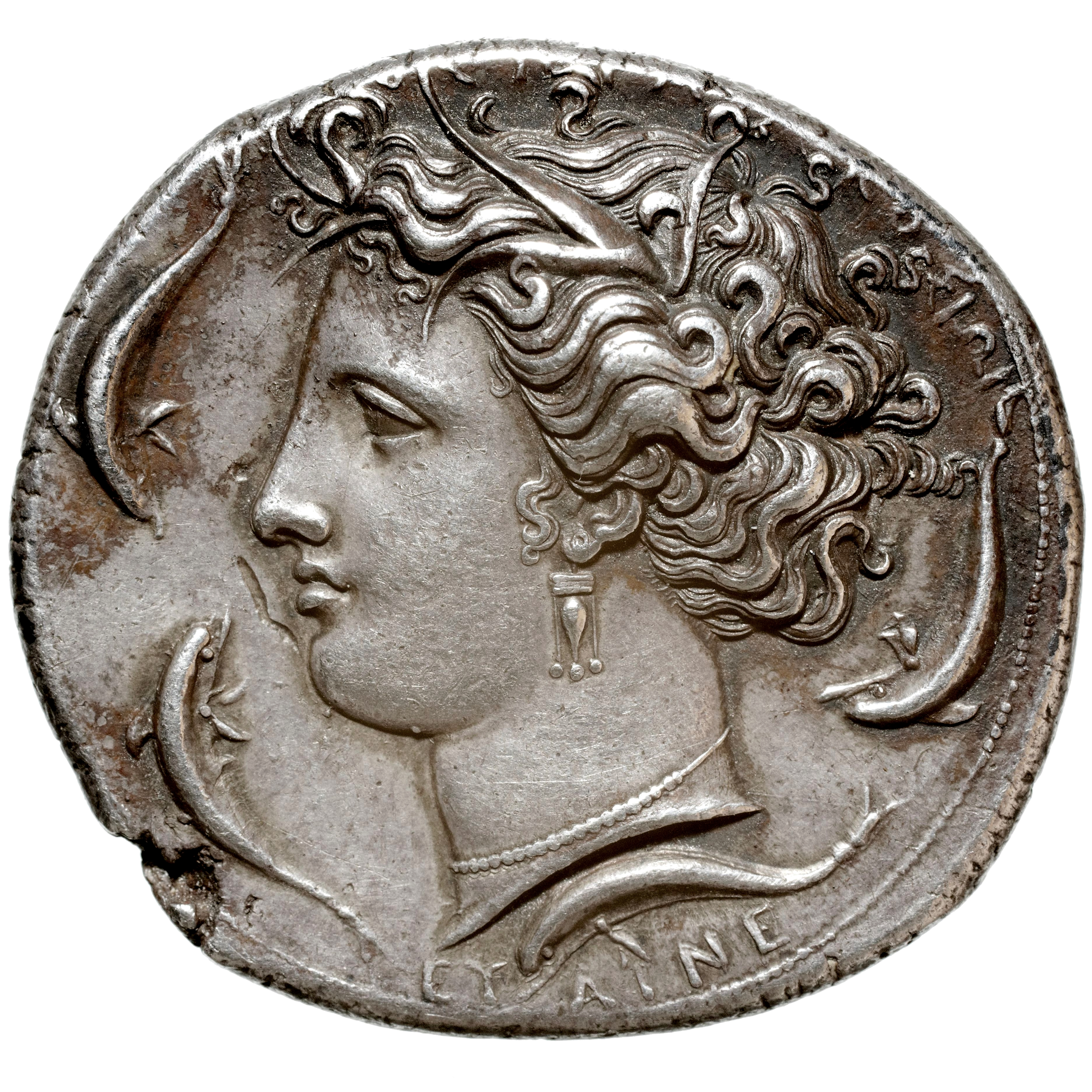 Décadrachme de Syracuse. Avers : Tête d'Aréthuse, quatre dauphins. Argent, 43,25 gr. vers -400. Collection Bnf, leg Smith-Lesouëf : Y 28912,8